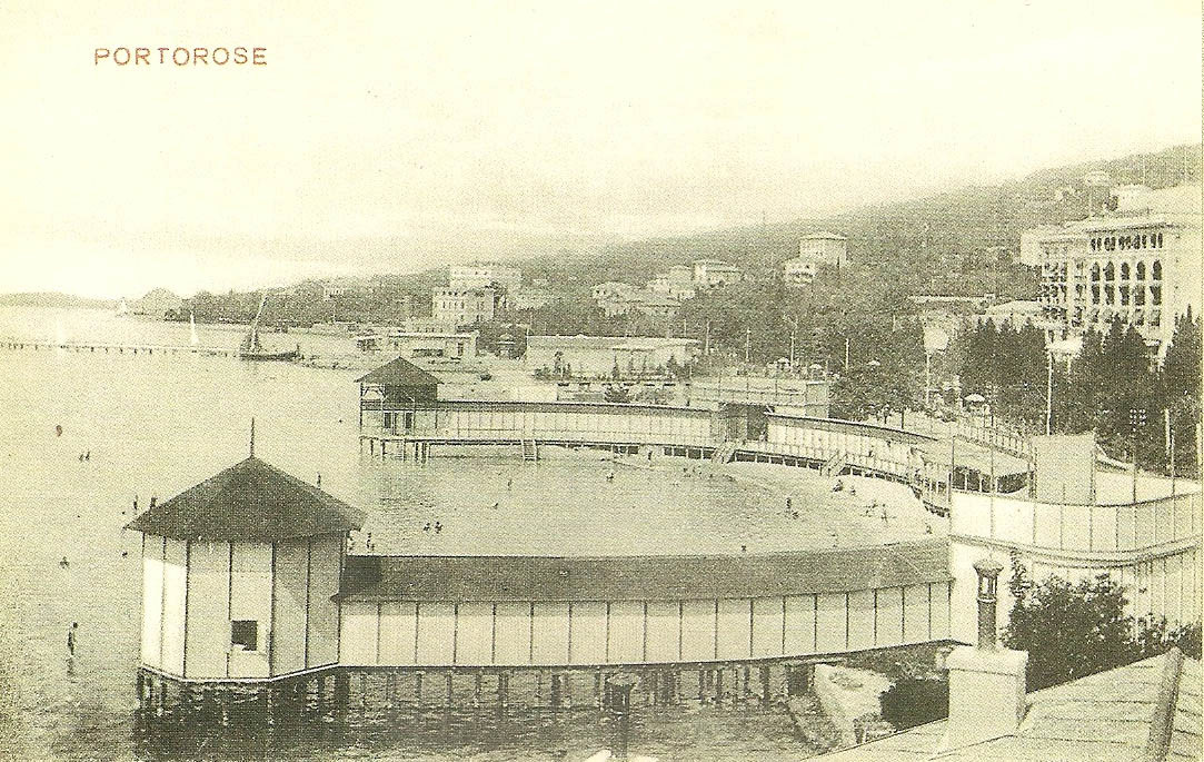 Razglednica Portoroža.